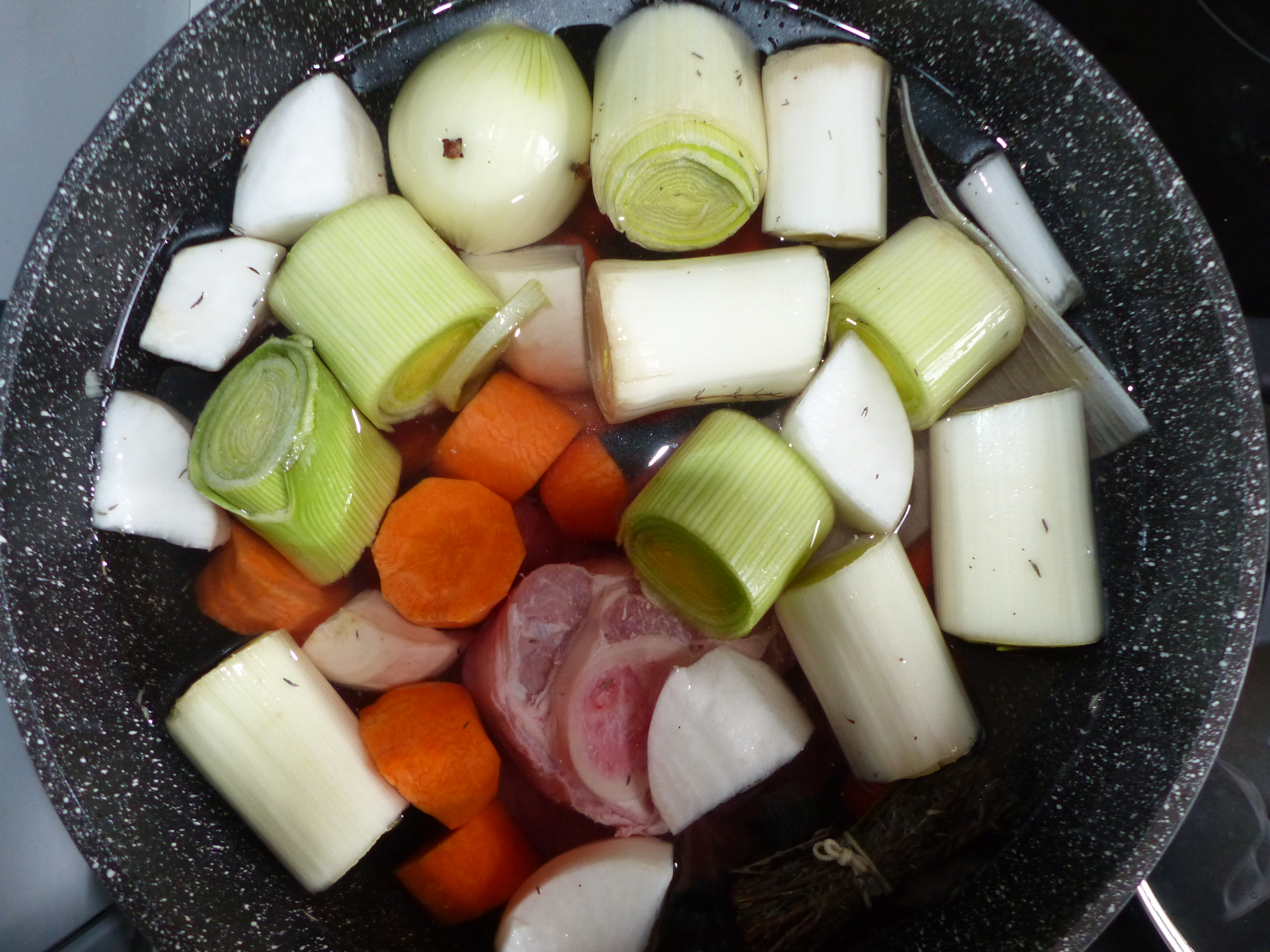 Pot-au-feu avant cuisson, à Josselin. Selon la recette de ma mère et de mon ex co-locataire.